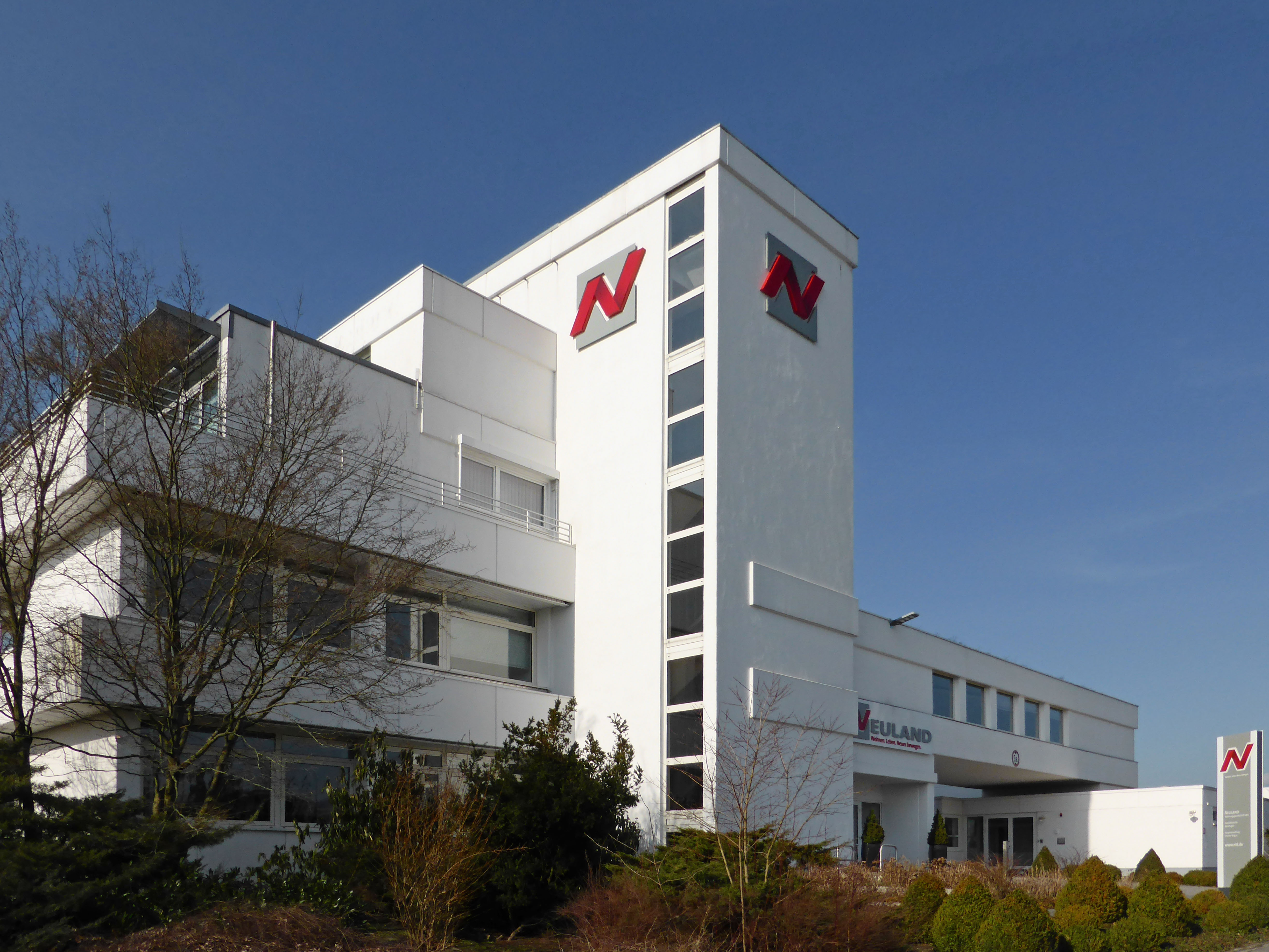 Verwaltungsgebäude der Neuland Wohnungsbaugesellschaft in Wolfsburg, Stadtteil Westhagen.